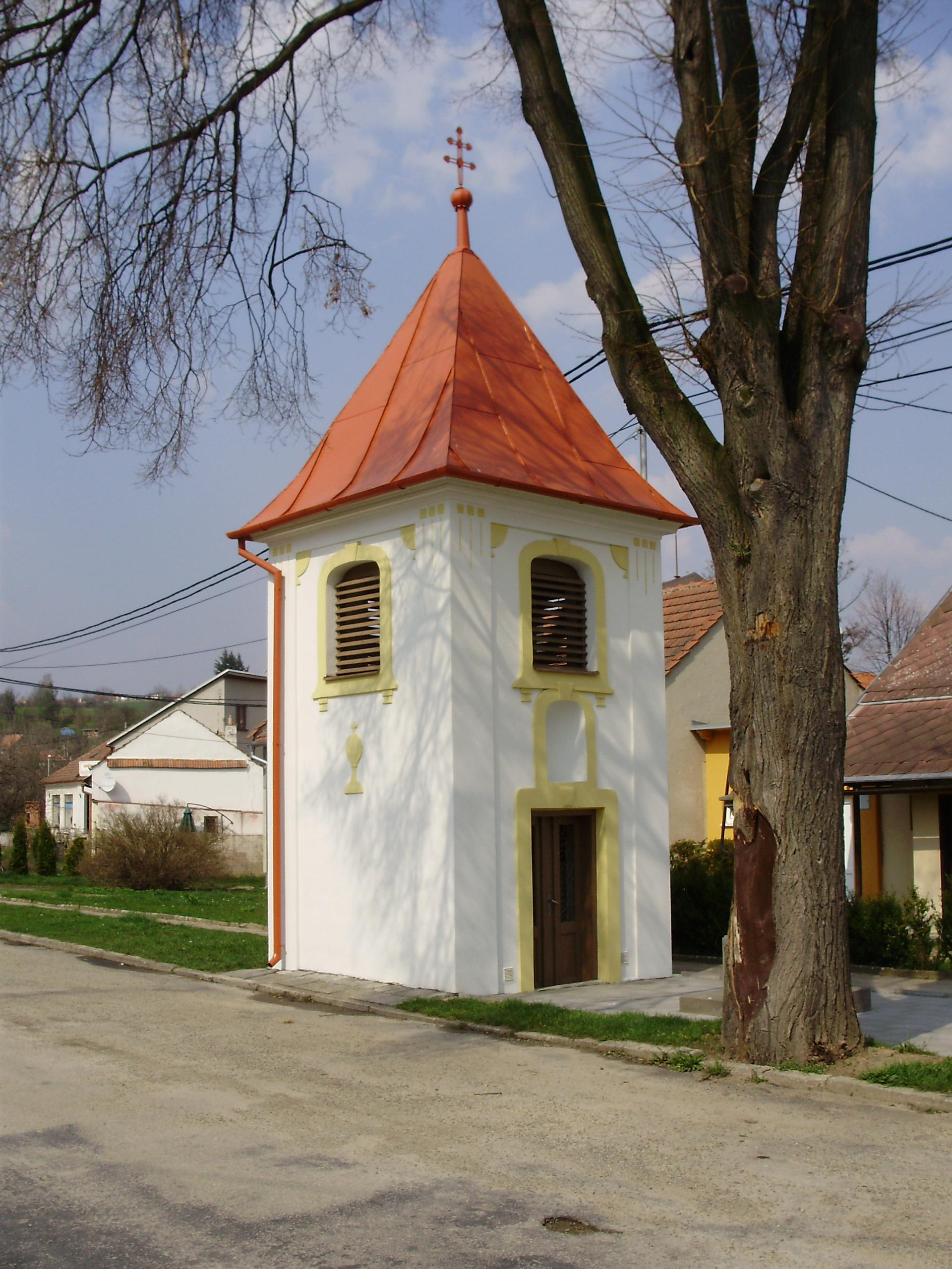 Zvonička Opatovice (opravená)